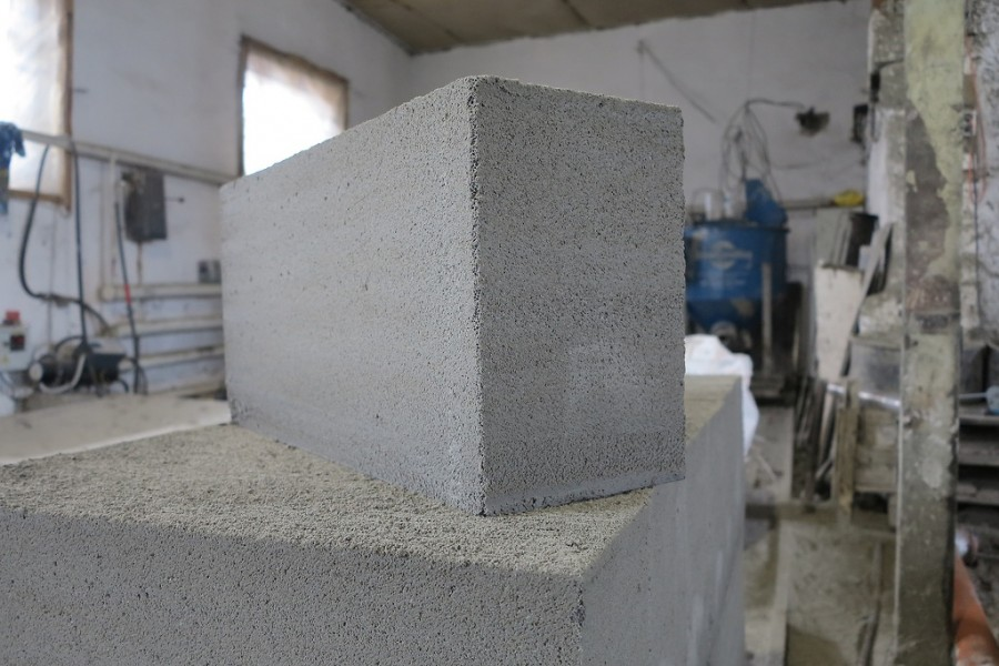 Блок из газобетона